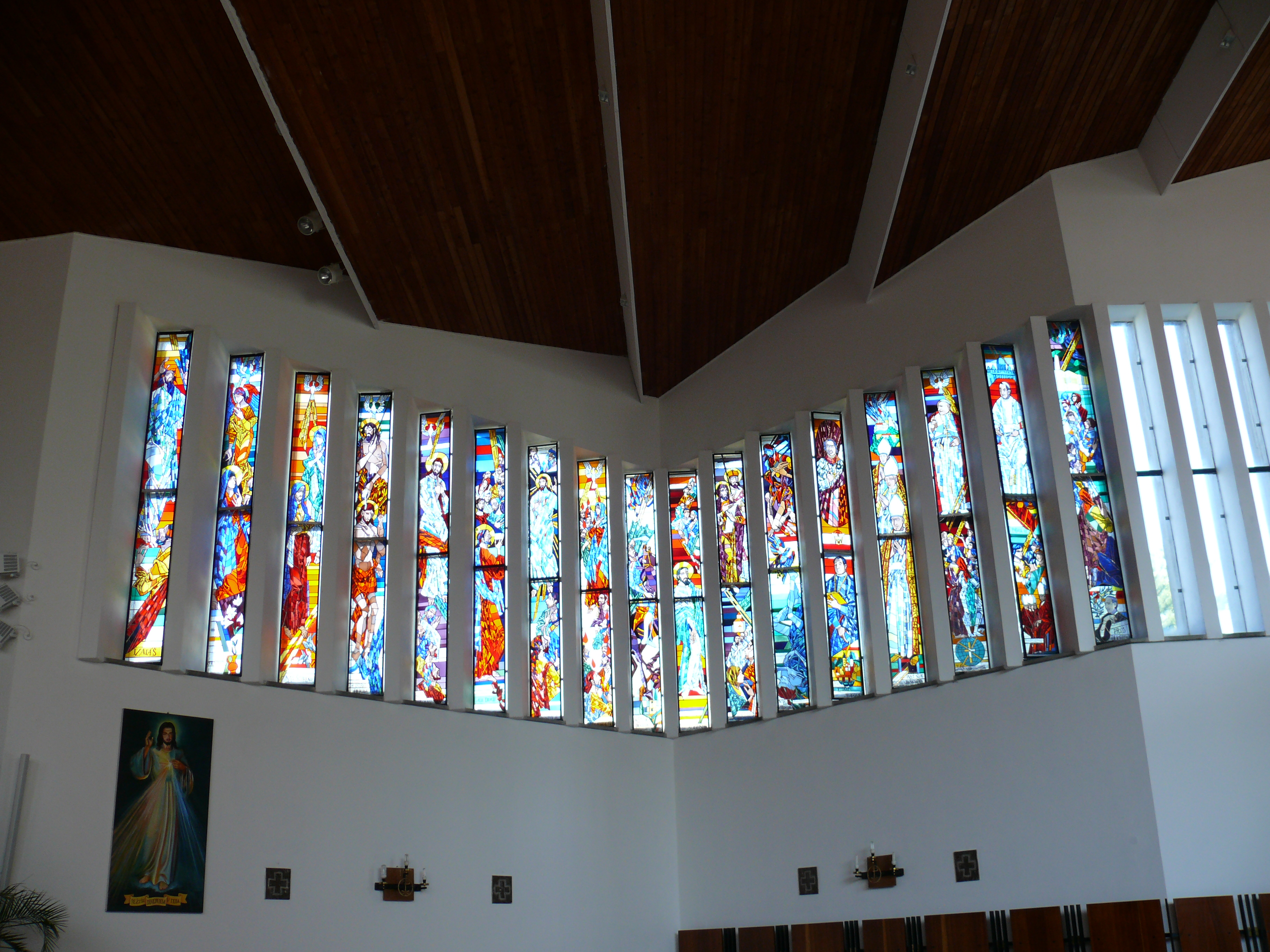 Church, Zborov nad Bystricou, Slovakia